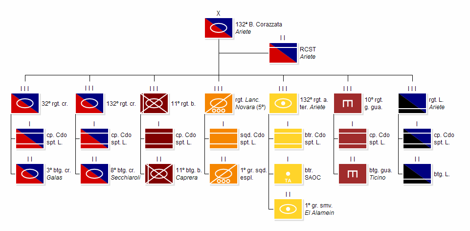 Attuale struttura della 132ª Brigata Corazzata "Ariete"